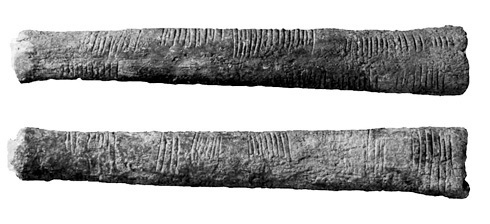 Huesos de ishango